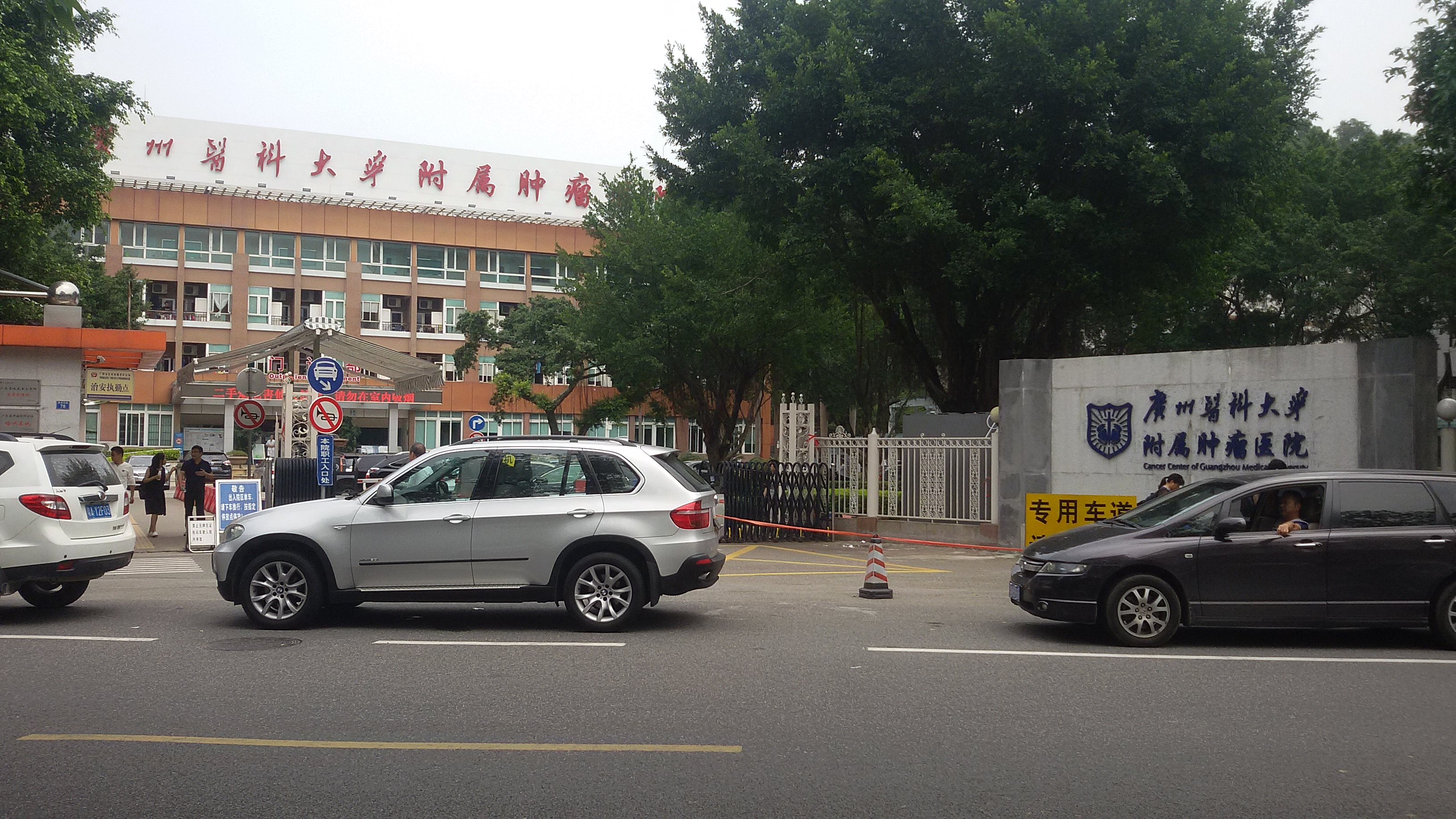 粵語: 廣州醫科大學附属肿瘤医院